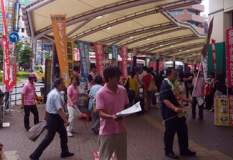 北島邦彦と中核派全学連活動家